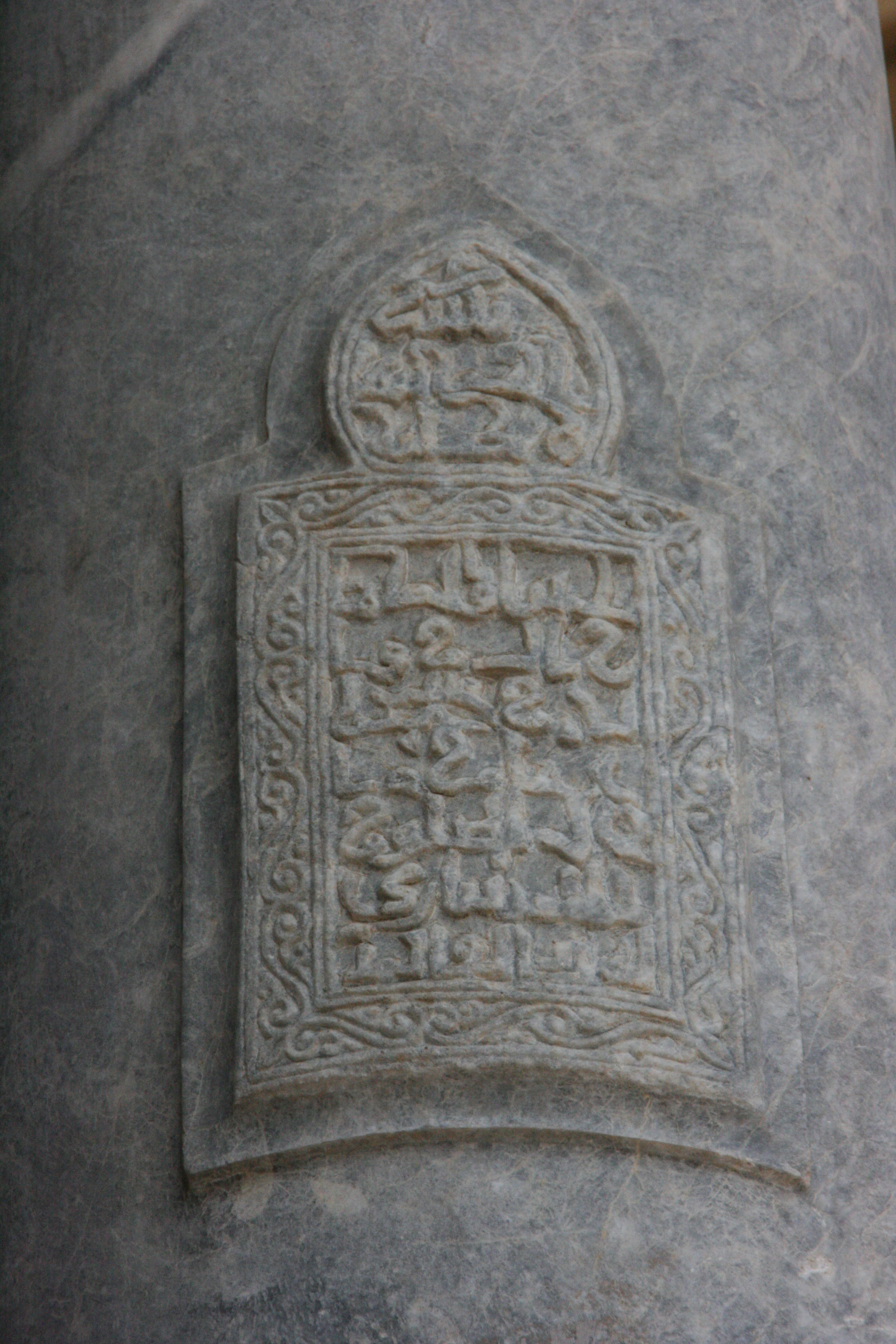 Arabische Inschrift am Dom von Palermo